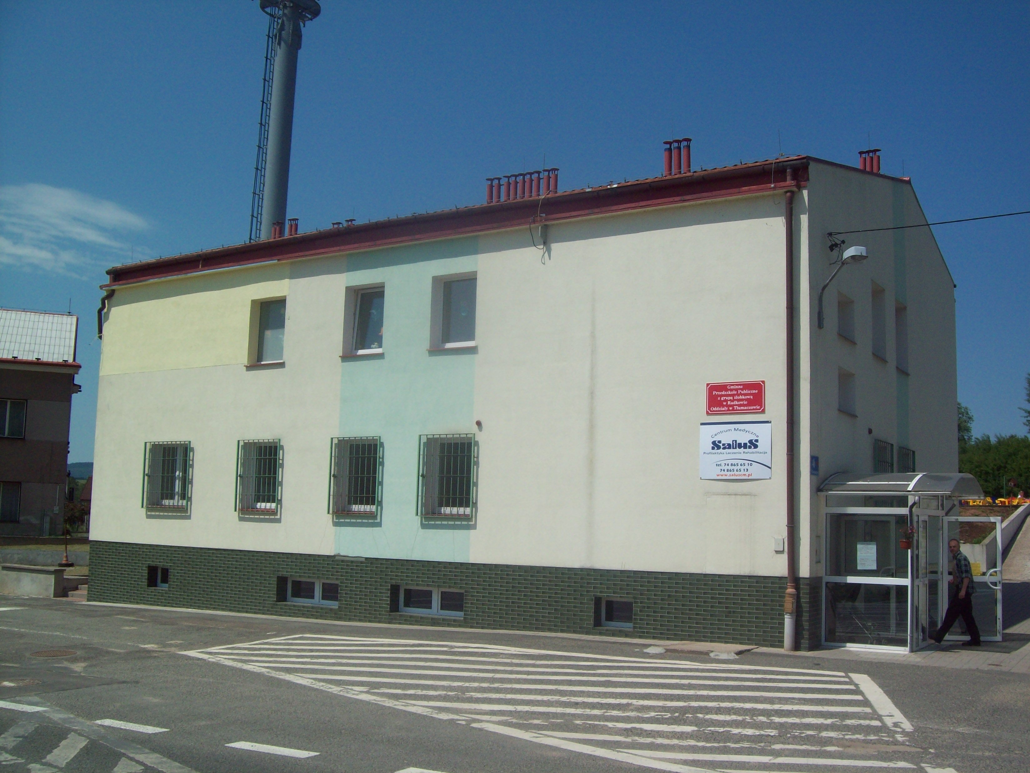 Przedszkole i punkt medyczny w Tłumaczowie